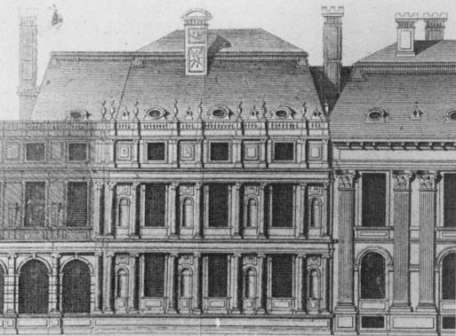 Tuileries. 'Bullant' pavilion. Detail of an engraving from Dom Michel Félibien: Histoire de la Ville de Paris , Tome II, 1725.